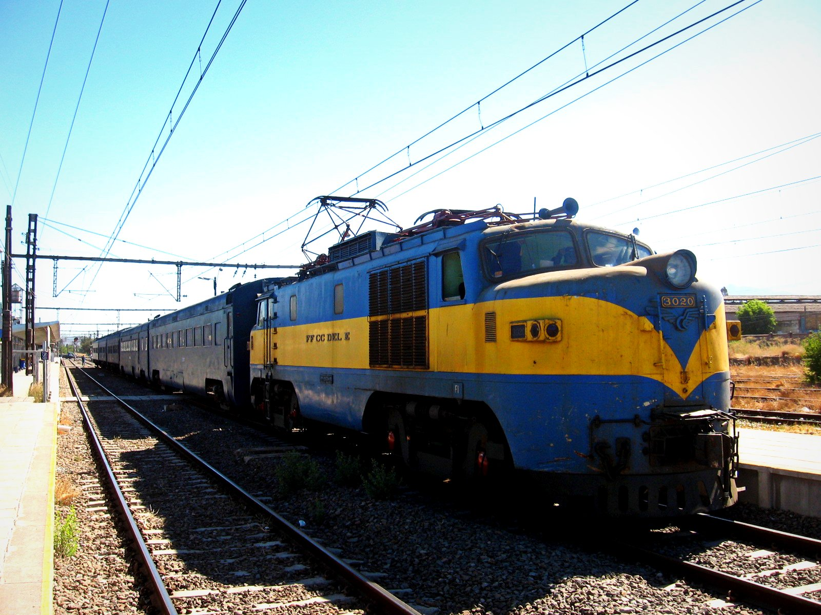 TransPacífico de Chile